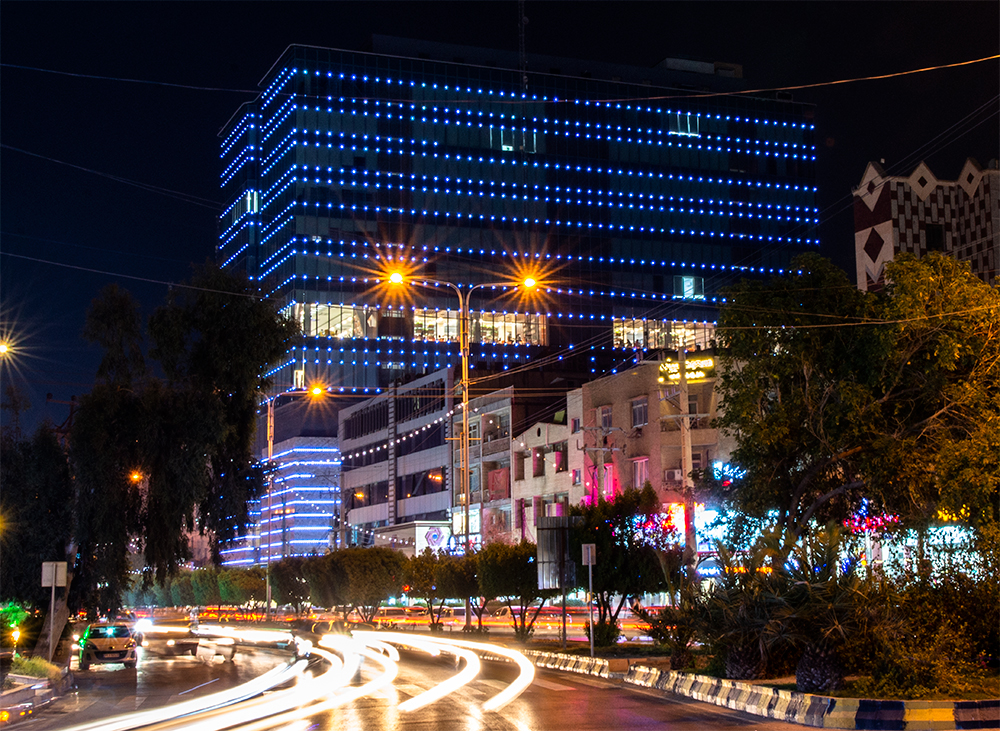 مجتمع تشریفات اهواز